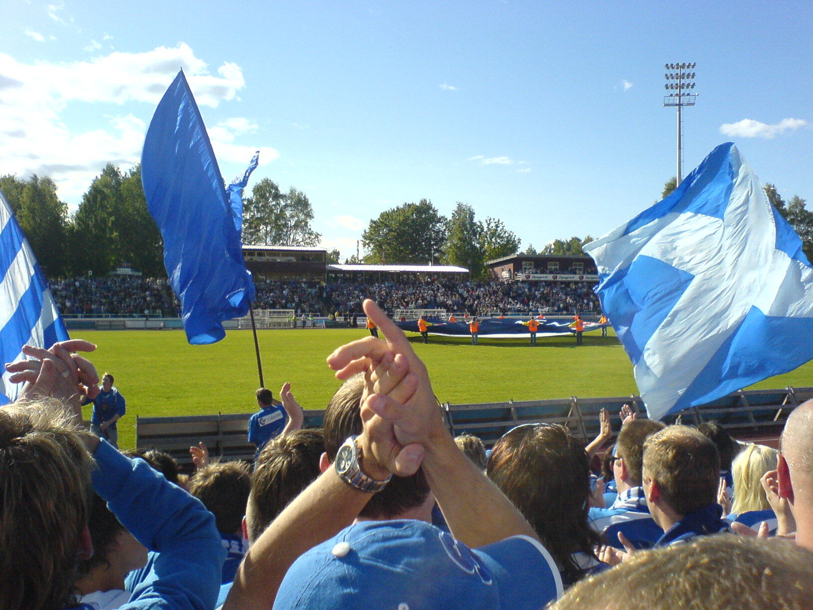 Storstadion